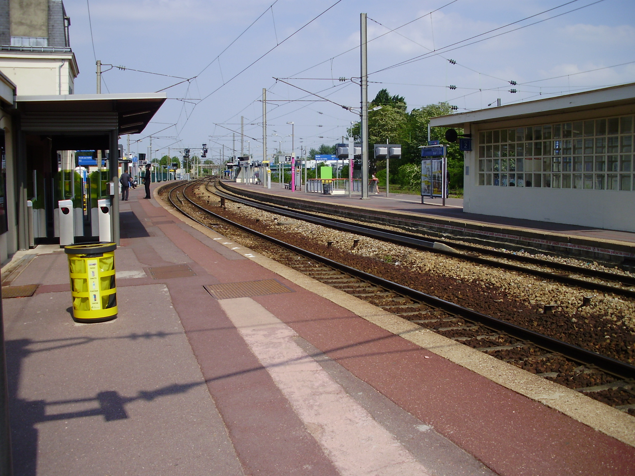 Gare de Montsoult - Maffliers, à Montsoult, Val-d'Oise, France : vue vers Persan - Beaumont / Luzarches depuis l'extrémité sud-ouest du quai de la voie 1